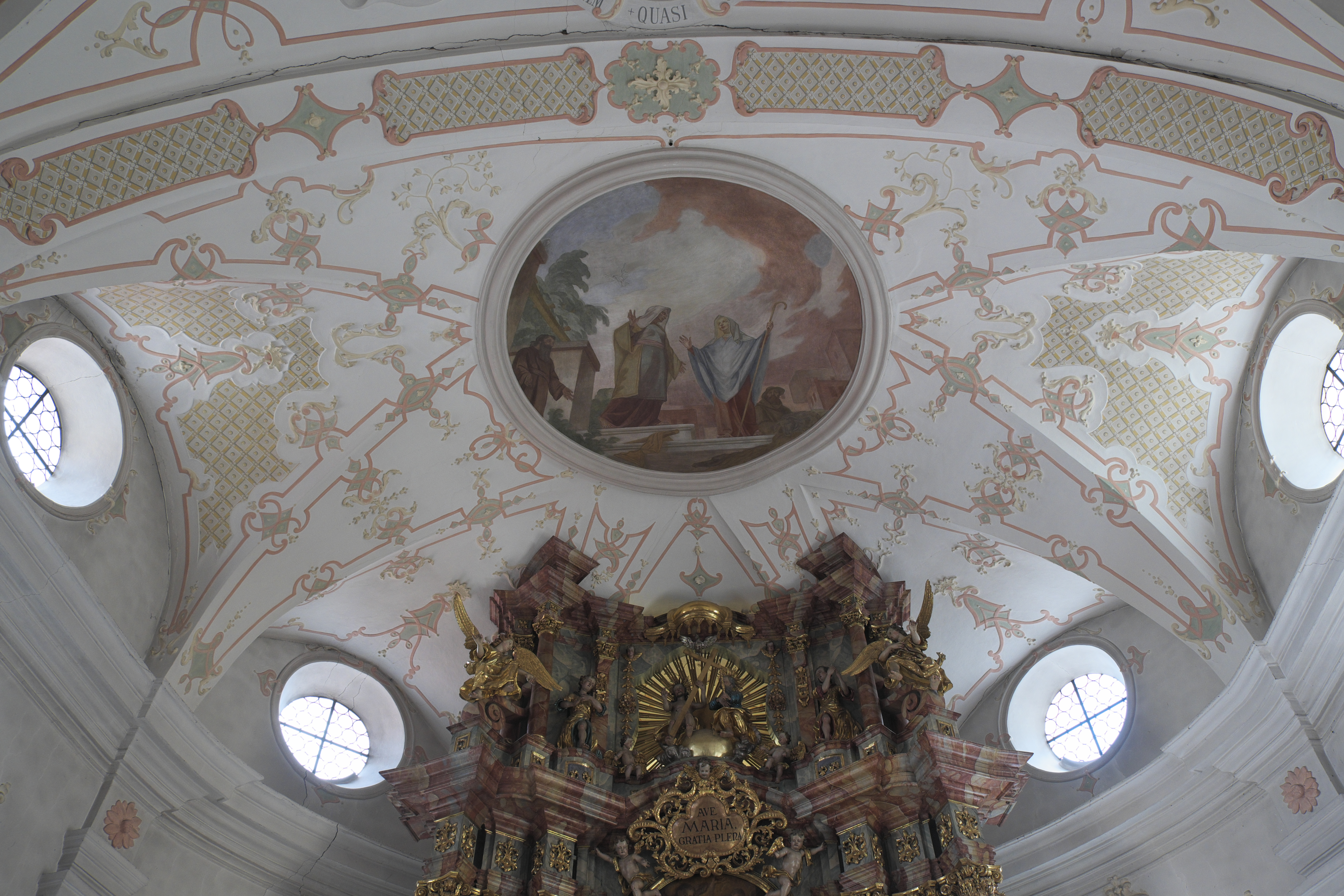 Katholische Pfarrkirche St. Johann Baptist in Riedenburg im niederbayerischen Landkreis Kelheim (Bayern/Deutschland), Deckenmalerei und Frührokoko-Stuck im Chor